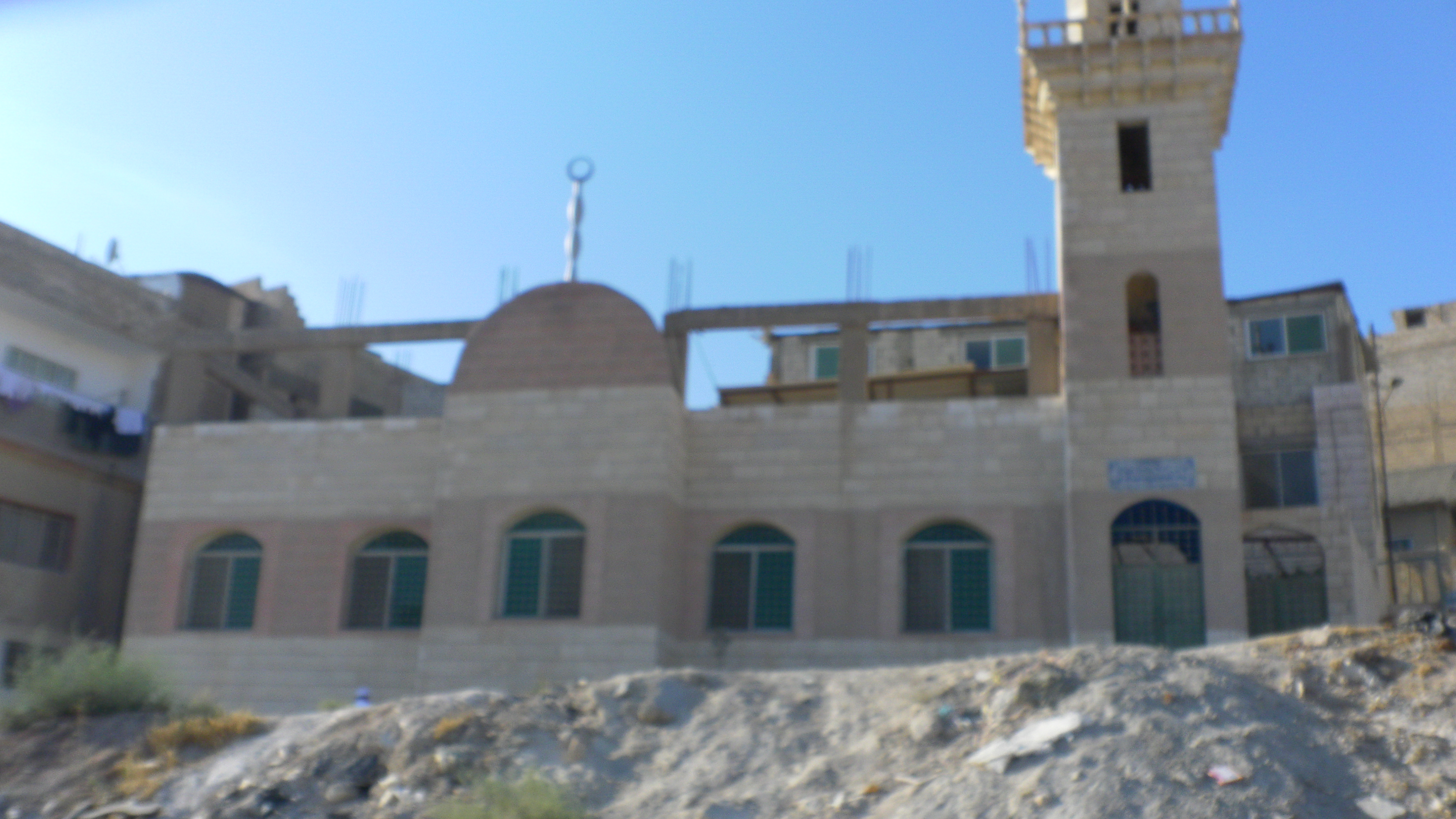 مسجد الحاجة بدرية في منطقة العامرية, الرصيفة, الزرقاء, الأردن